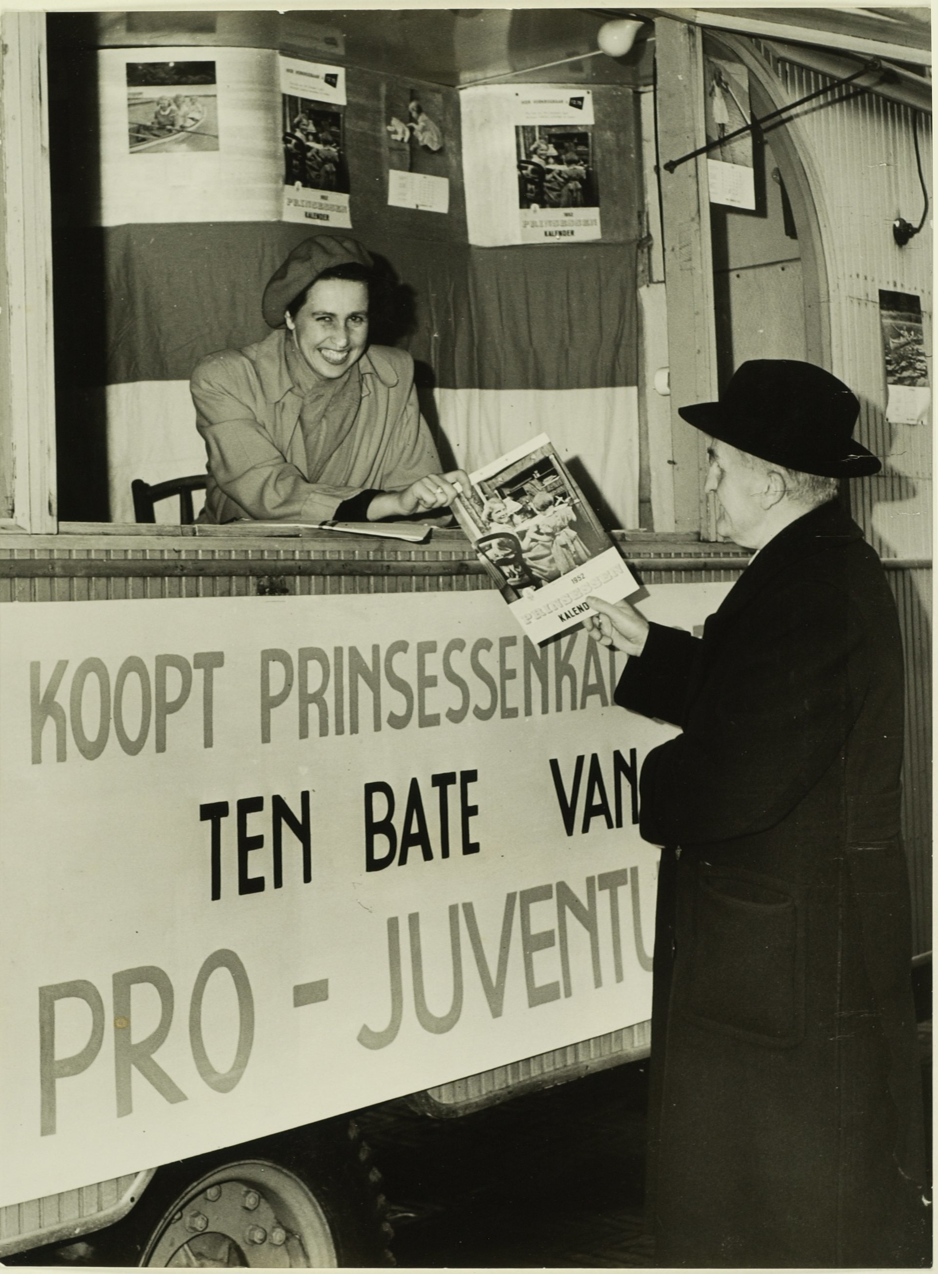 CollectieCollectie Fotoburo de BoerInventarisnummerNL-HlmNHA_5400464771 BeschrijvingIn een stand op de grote markt verkoopt mevrouw Cremers-de Bruijn Prinsessenkalenders ten bate van Pro JuventuteFotonummerNL-HlmNHA_5400464771DocumenttypeHistorieprenten, tekeningen en foto'sVervaardigerBoer, Cees de (1918-1985) Naam objectGrote MarktLandNederland ProvincieNoord-Holland GemeenteHaarlem PlaatsHaarlem Begindatum1969Einddatum1969TechniekFoto Plaatsinggb40